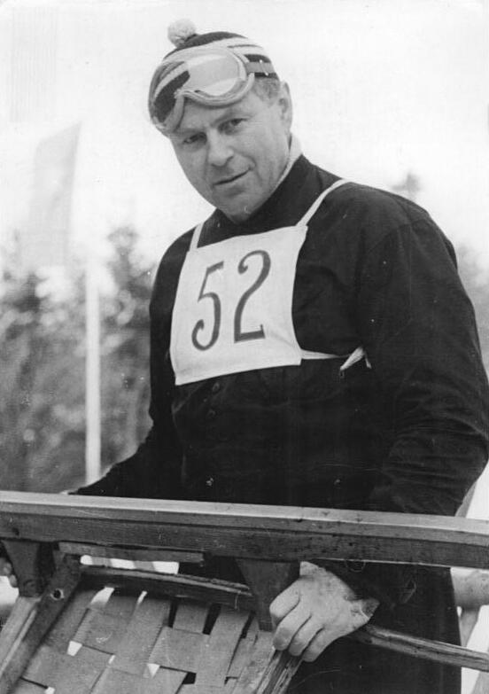 Zentralbild Wlocka-Schaar 8.2.1954-Rodelmeisterschaften der Deutschen Demokratischen Republik vom 3.-7.2.1954 in Oberhof-Die Meisterschaften im Gemischten Doppel wurden am 7.2.1954 auf der Wadsberg-Bobbahn ausgetragen. UBz: Der ehemalige Europa- und deutsche Meister Walter Feist unterzieht seinen Schlitten einer letzten Prüfung. Er gewann die Meisterschaft im Männer-Einer 1954 und belegte im Gemischten Doppel und Männerdoppel den 2. Platz.